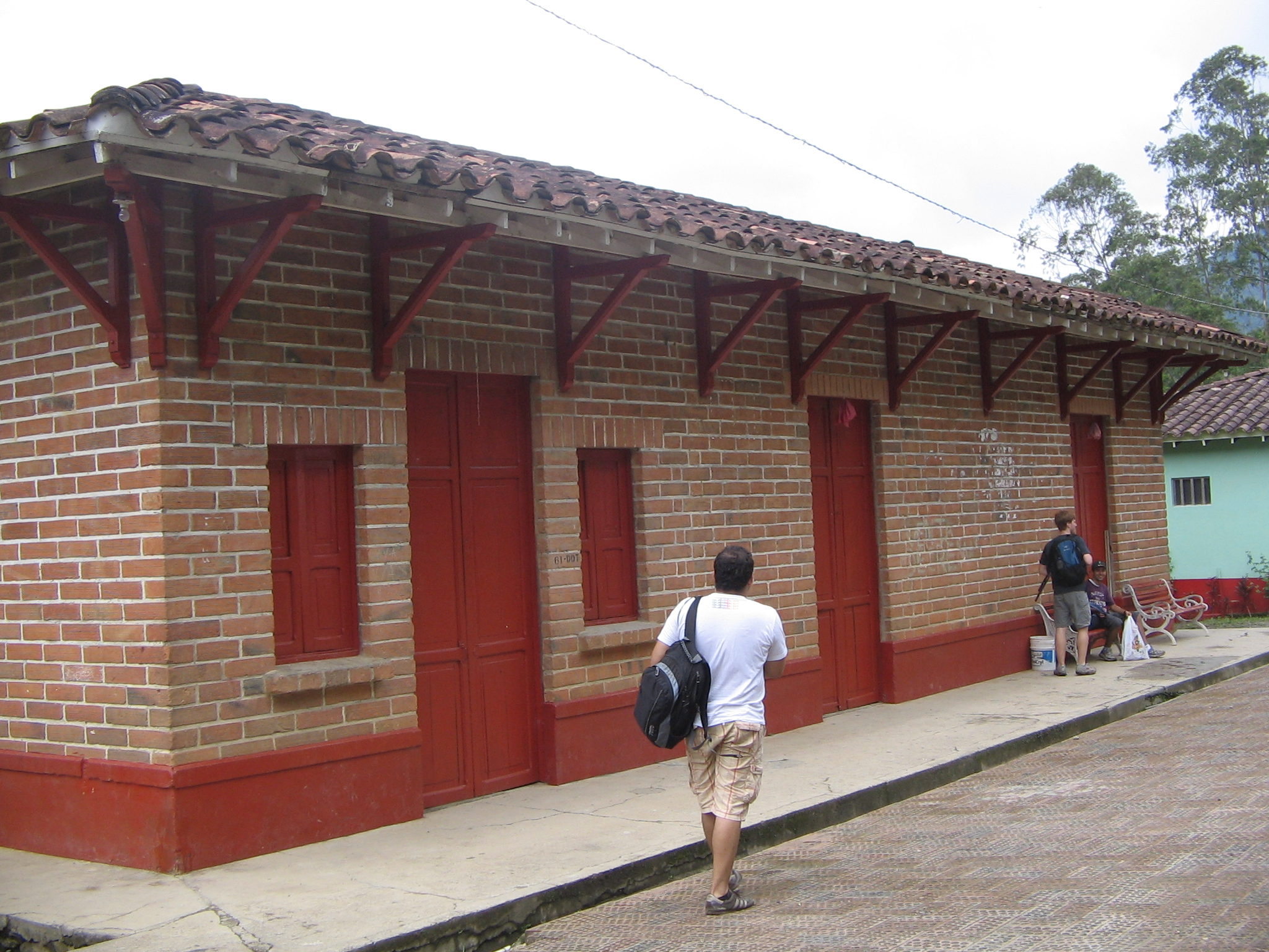 Caminata Ecológica Couch Surfing 8 de febrero 2009, Amagá. Estación Los Jacobos (?).